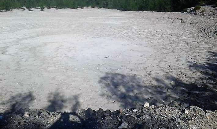 Der Schlammvulkan von Raitahu